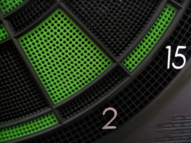 Powierzchnia elektronicznej tarczy do Darta